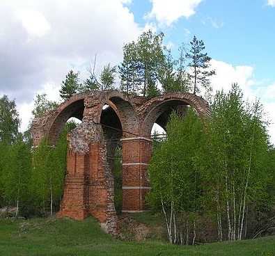 Ruins of russian church, Prudki village, near Spas-Klepiki. Деревня Прудки. за озерами под Спас-Клепиками